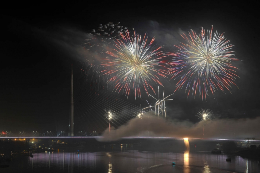 Vatromet Most na Adi